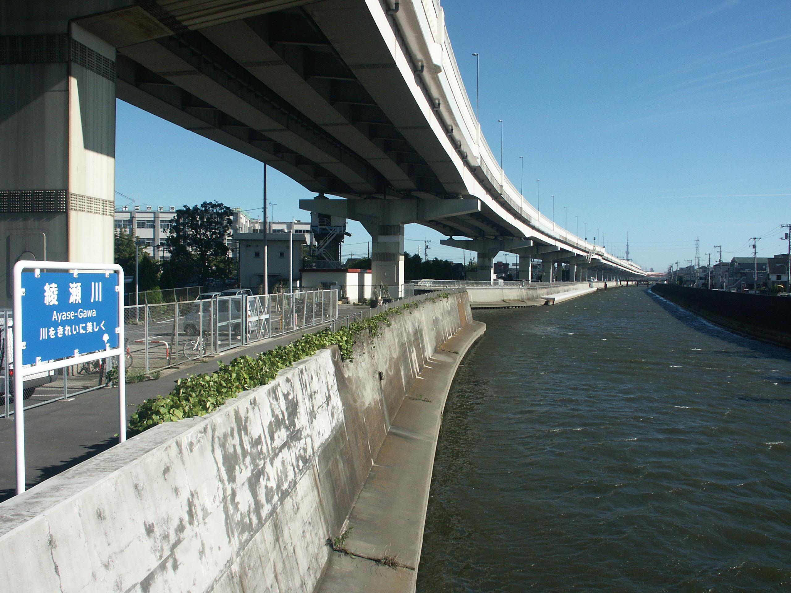 綾瀬川（東京都足立区内匠橋南側から撮影）